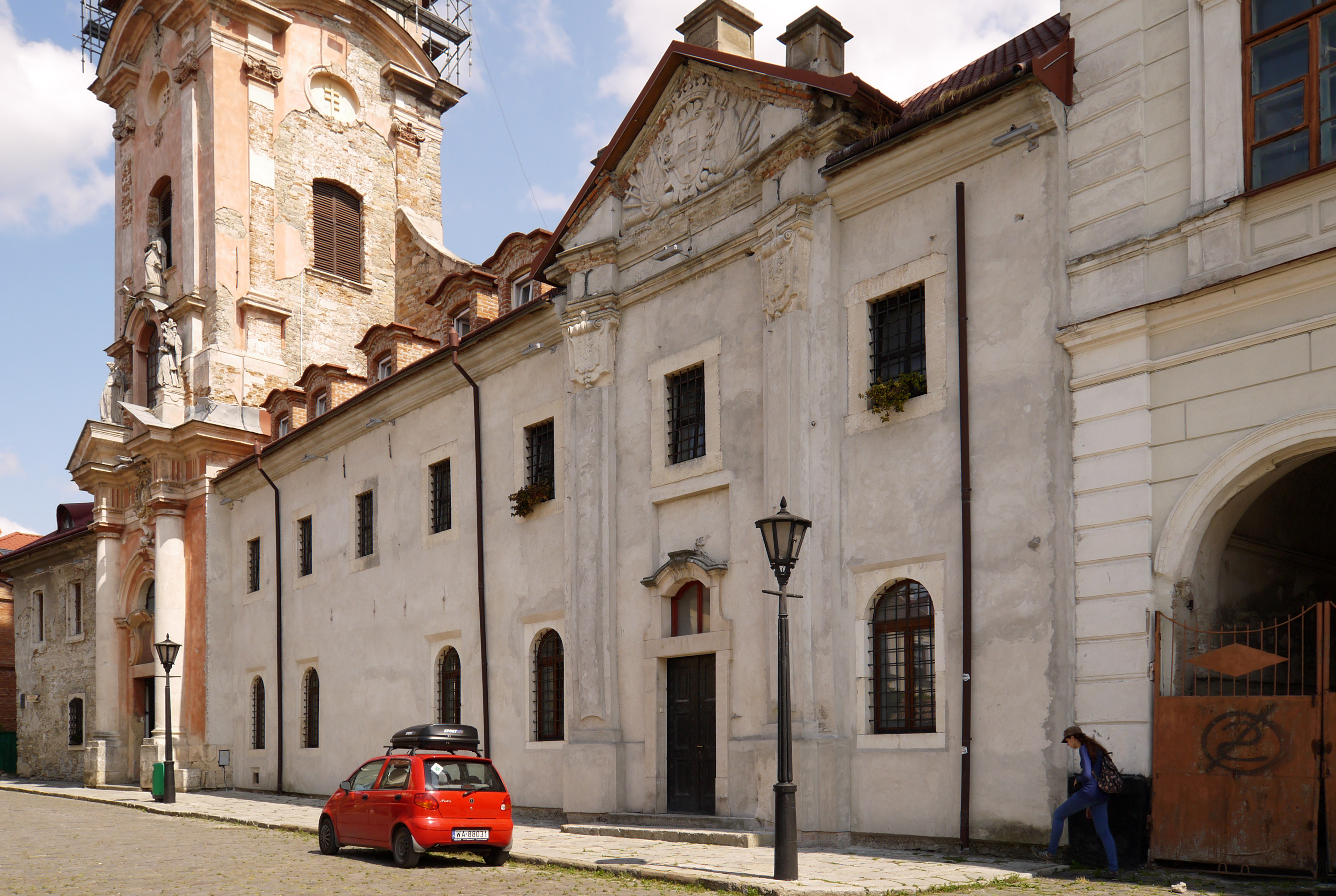 Трапезна монастиря домініканців, Кам'янець-Подільський, вул. Домініканська, 1а